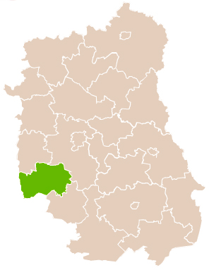 Map of Kraśnik county, Lublin voivodship Mapa powiatu kraśnickiego, województwo lubelskie